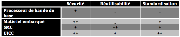 Tableau synthétisant les éléments sécurisés de la technologie NFC